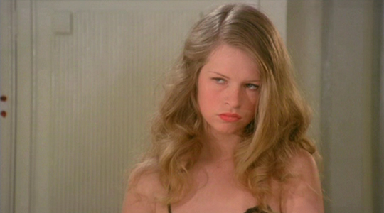 Teresa Ann Savoy a Kitty szalon (Salon Kitty) c. filmben